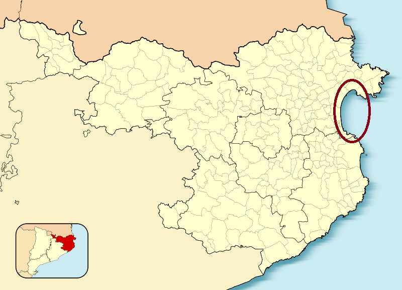 Mapa de la província de Girona, localitzant el Golf de Roses